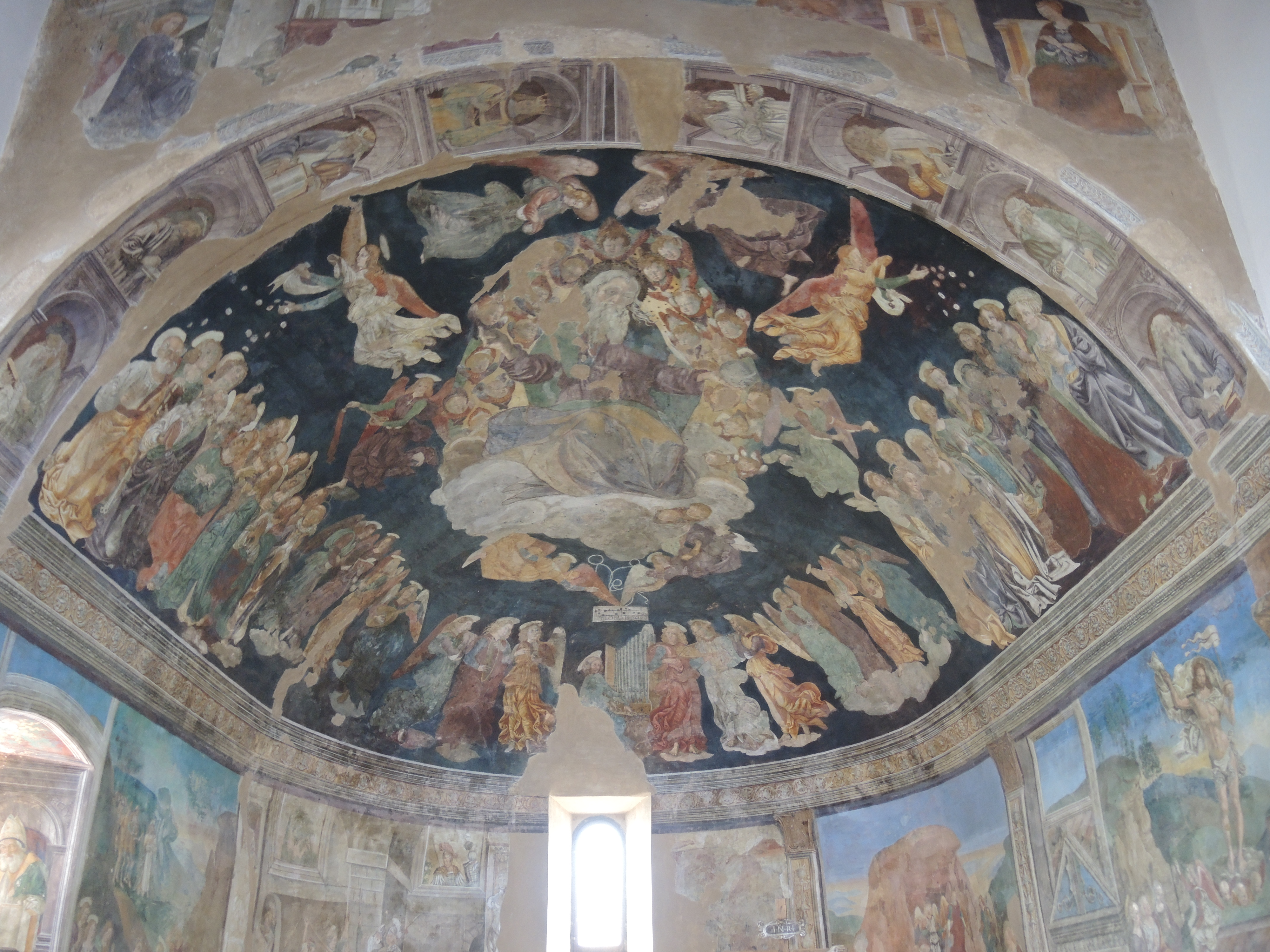 Tornimparte: Chiesa di San Panfilo